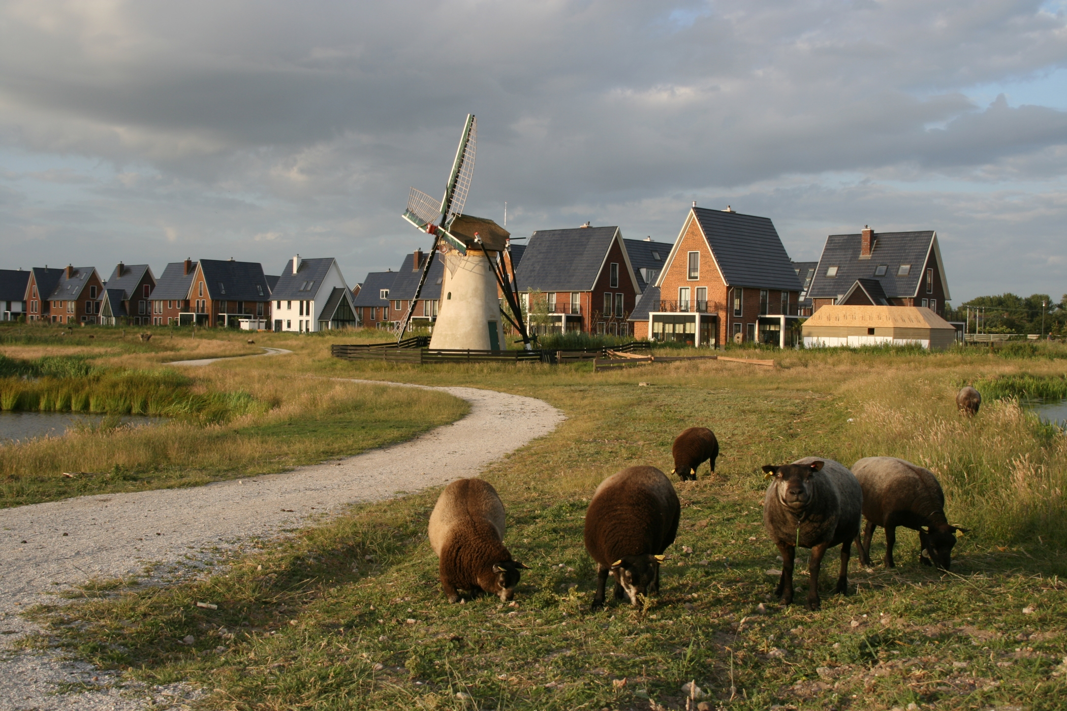 Warmond: molen 't Poeltje met nieuwbouw te dichtbij